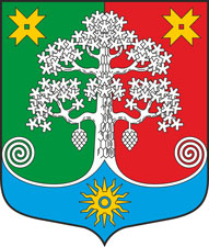 Герб Сегежского района, Карелия